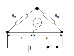 Schéma můstkové metody